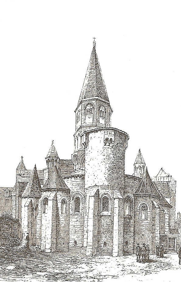 St-Pierre de Le_Dorat, Druckgrafik